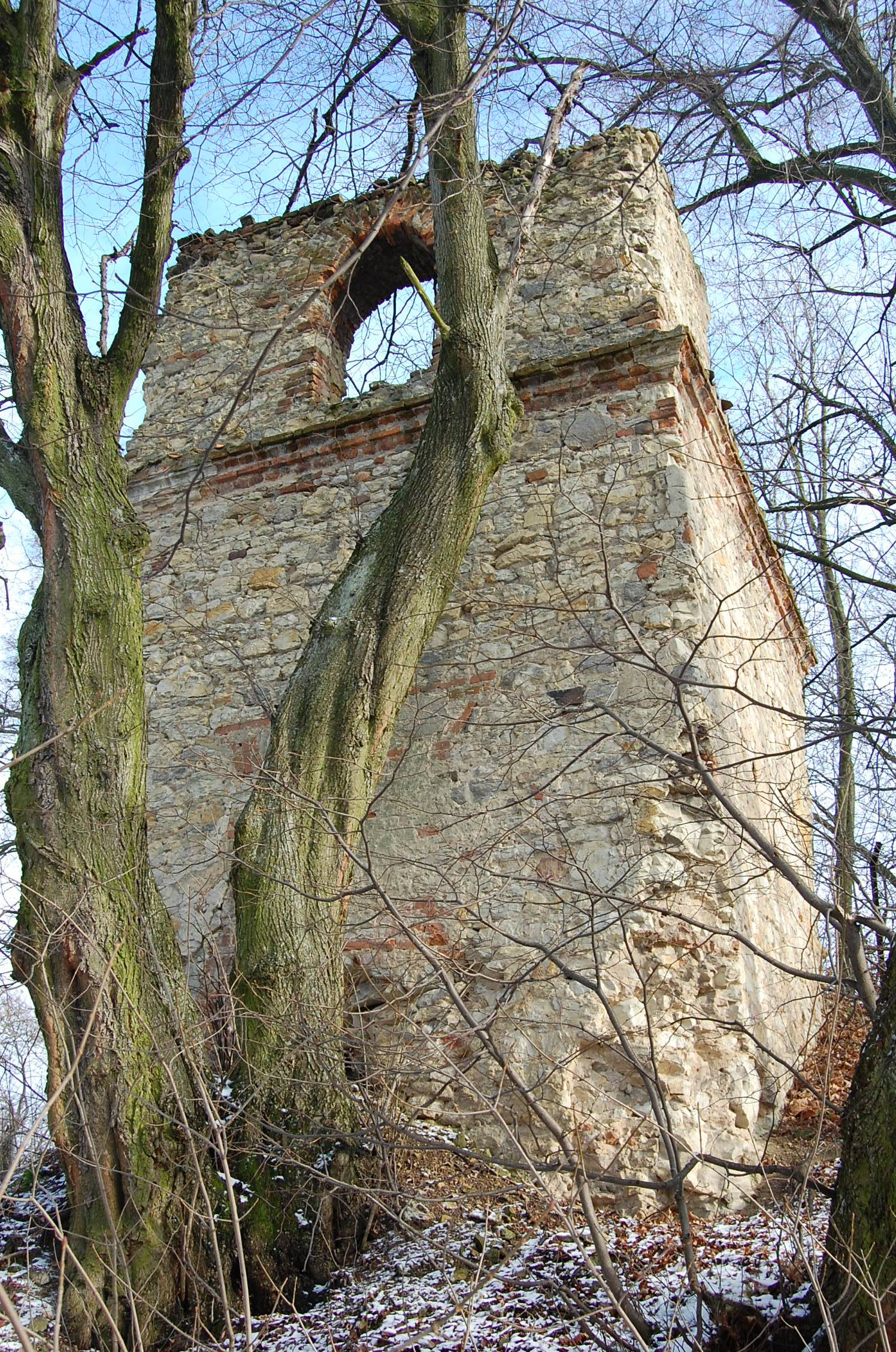 Dzwonnica z XVII wieku w Konopnicy